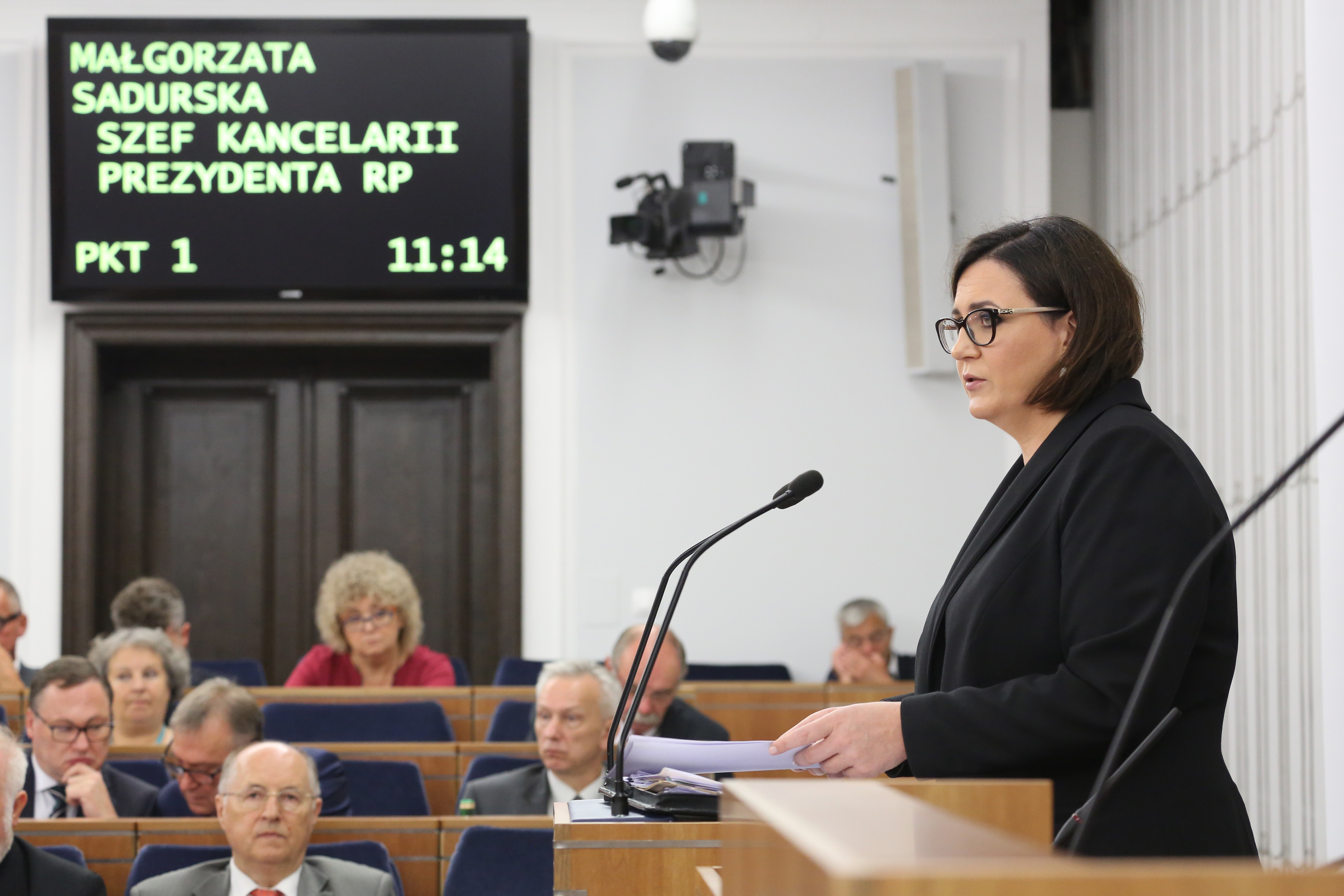 Szefowa Kancelarii Prezydenta Małgorzata Sadurska podczas 81. posiedzenia Senatu